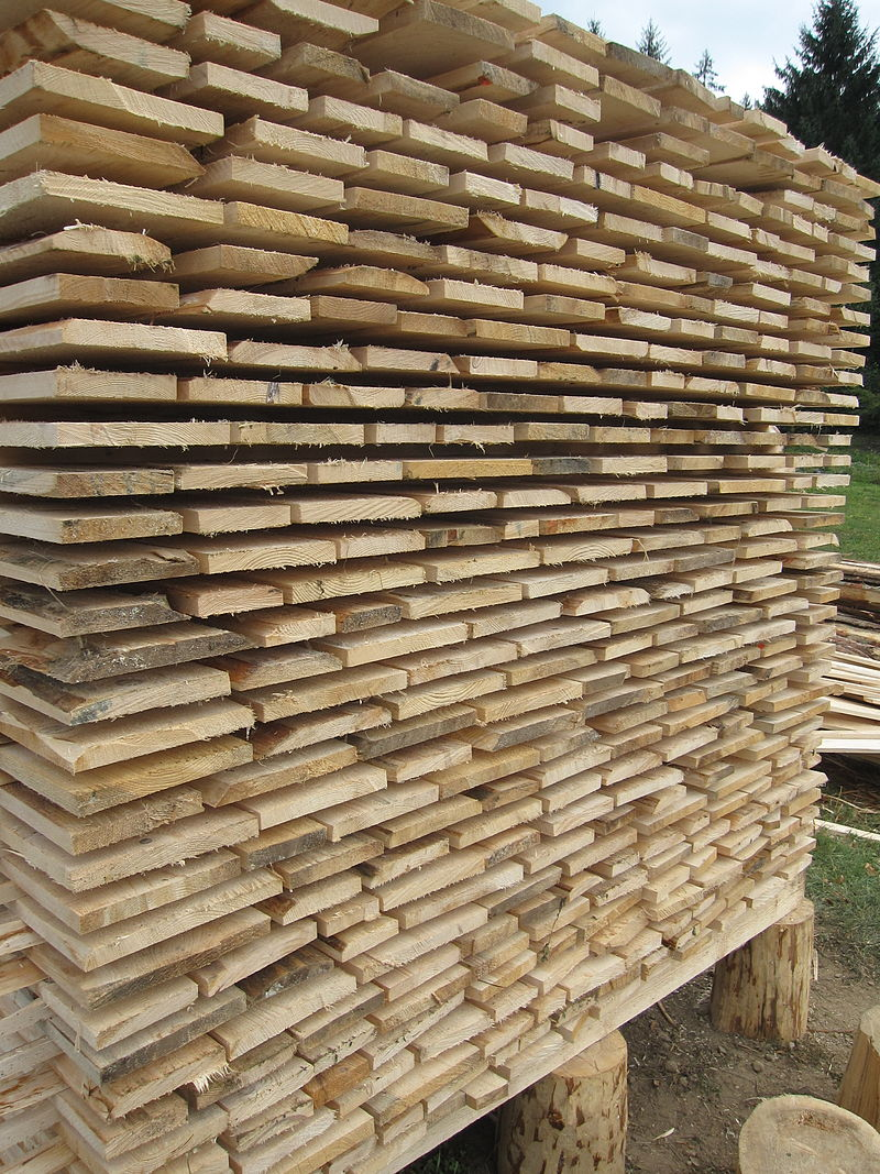 Puidu kuivamine välisõhus.